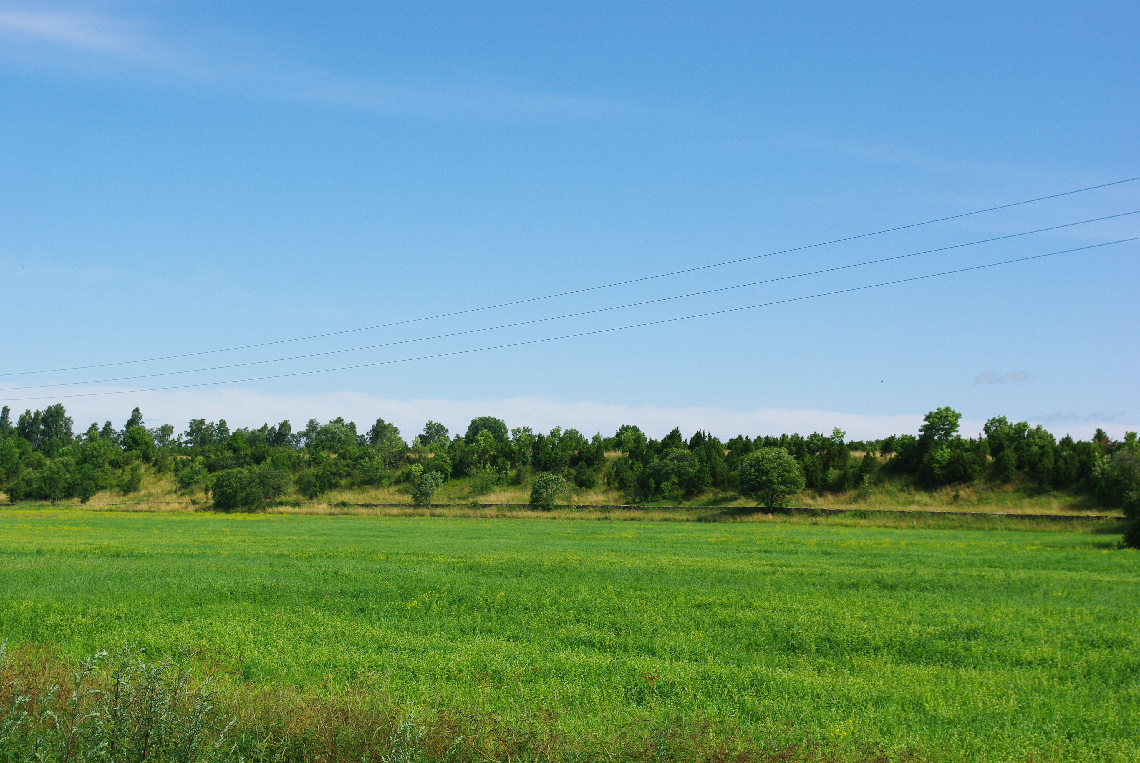 Muuksi linnamägi